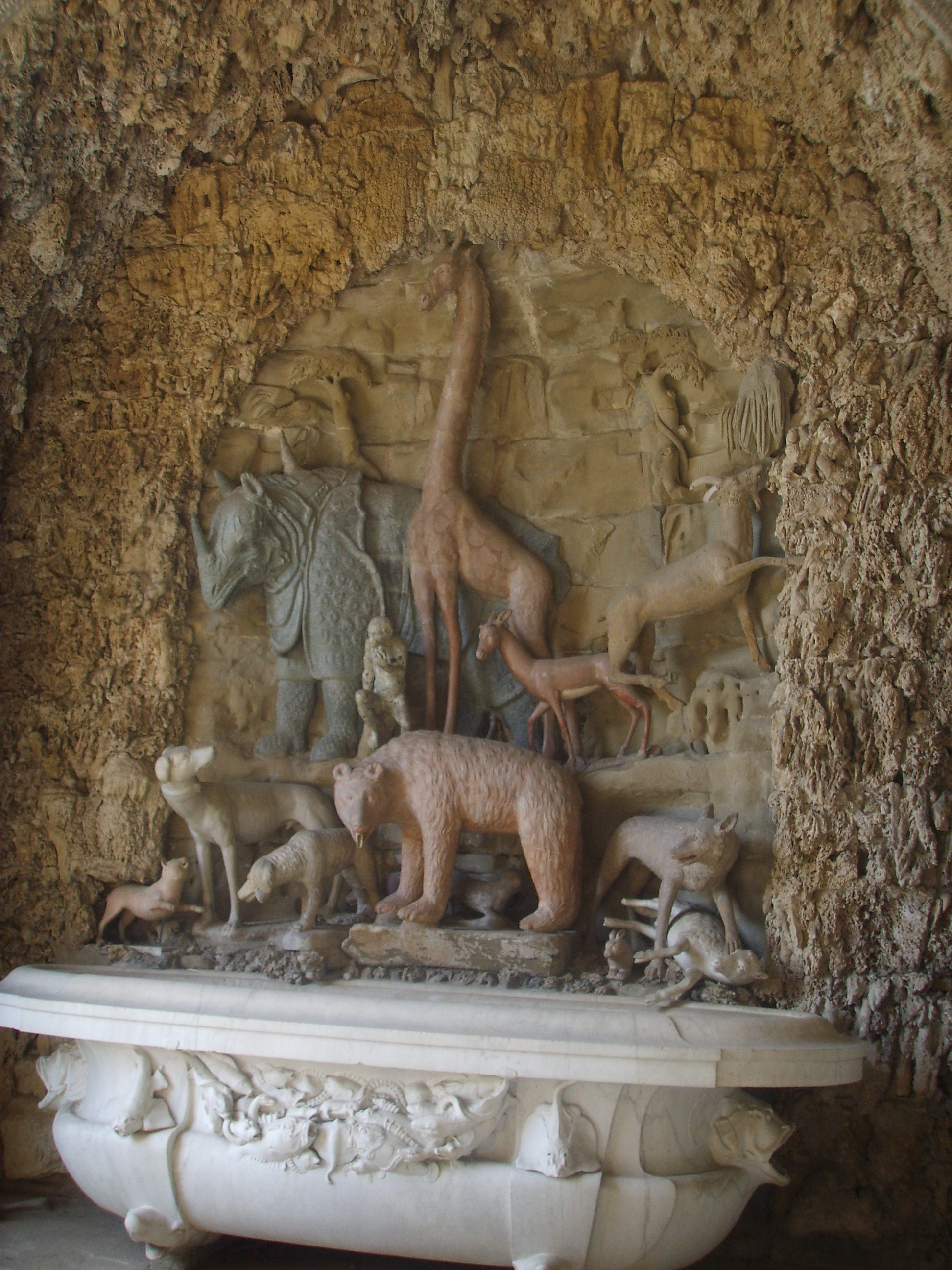 Parco di Villa Reale di Castello (Villa di Castello). Grotta degli animali by Giambologna in Florence, Italy